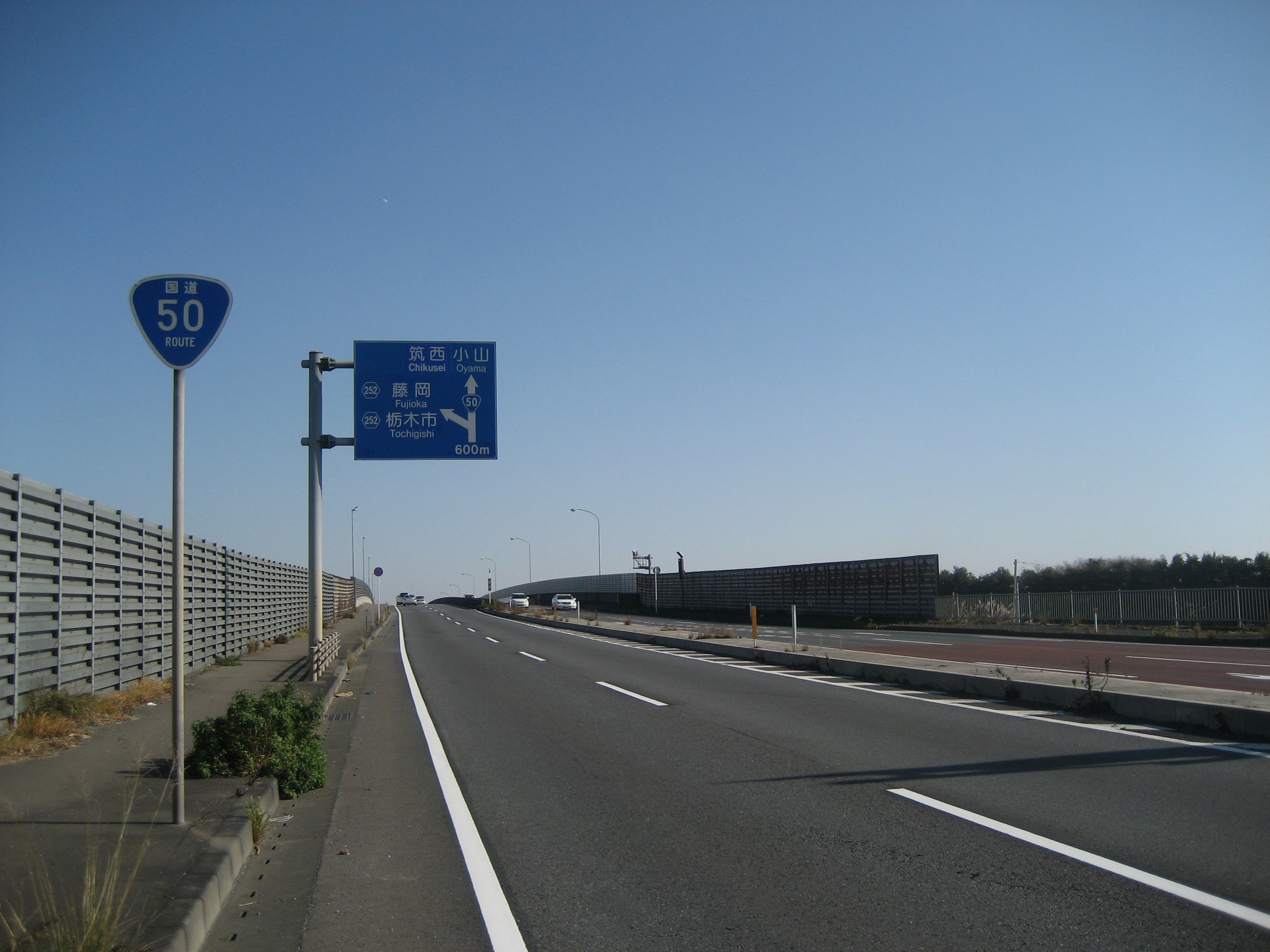 国道50号線栃木県下都賀郡岩舟町大平高架橋付近